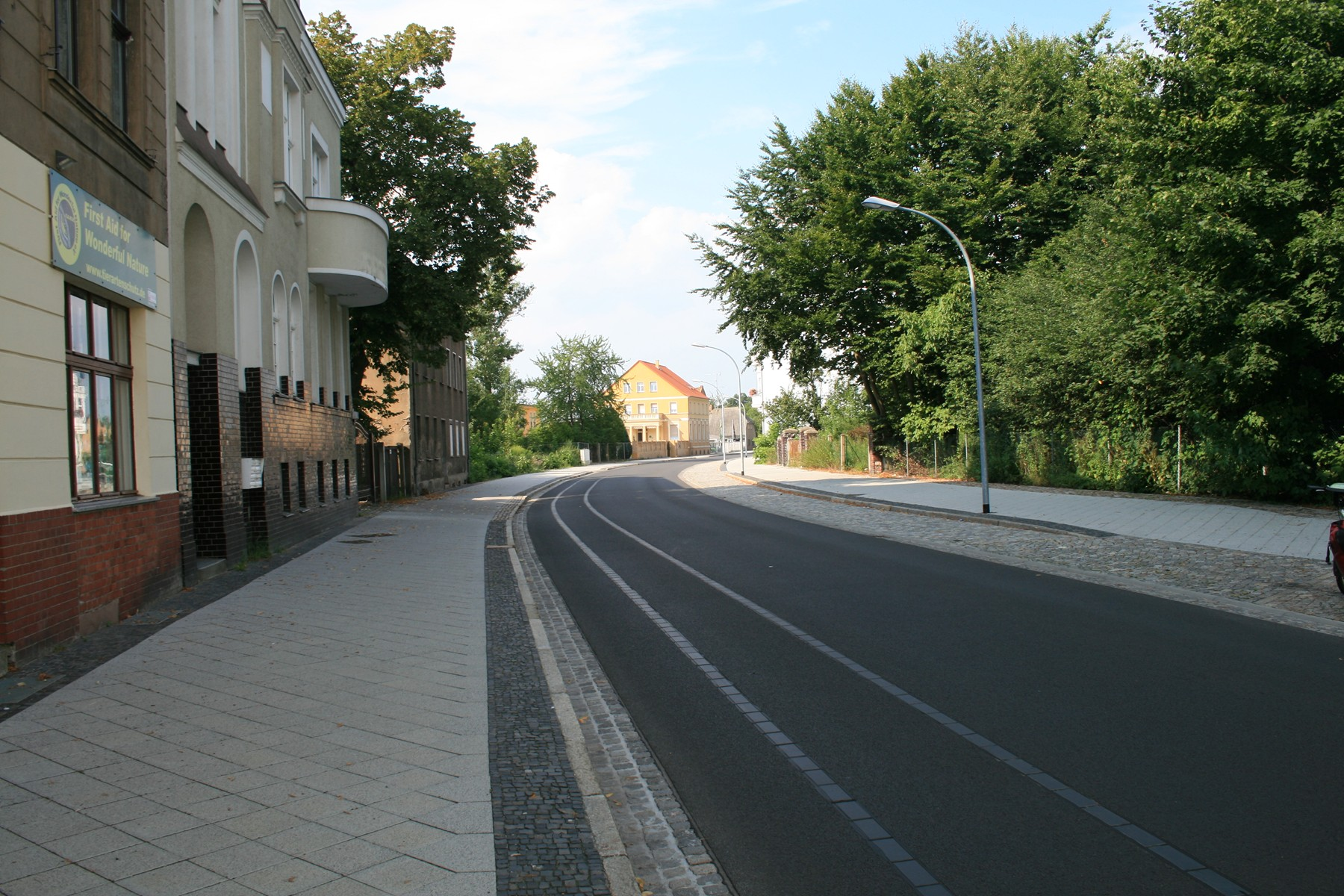 Forst (Lausitz), Deutschland. Gubener Straße. Markierung der Gleislage von ehemaligen Forster Stadtbahn. Links befindet sich das denkmalgeschützte Haus Gubener Straße 36a.